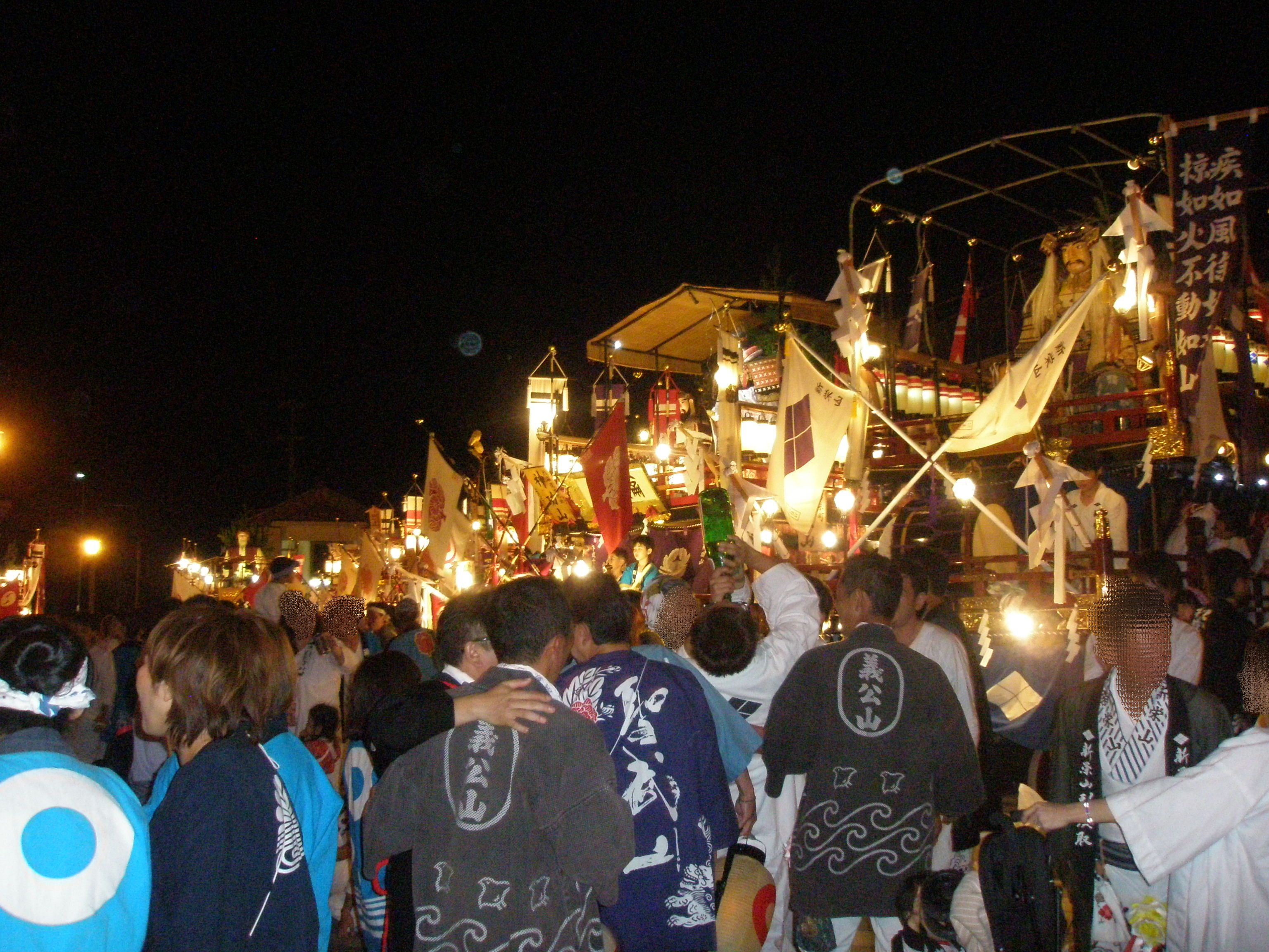 姥神大神宮前に集合する山車2